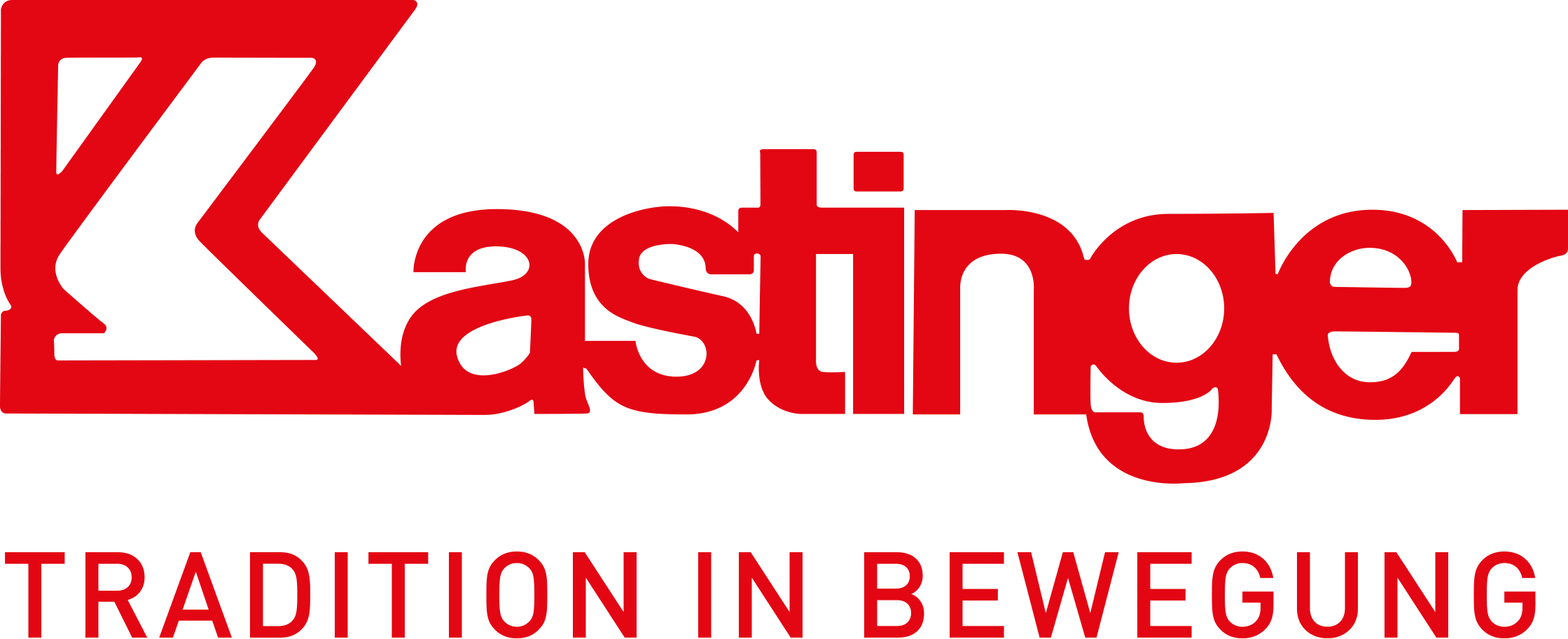 Kastinger Logo Wiki